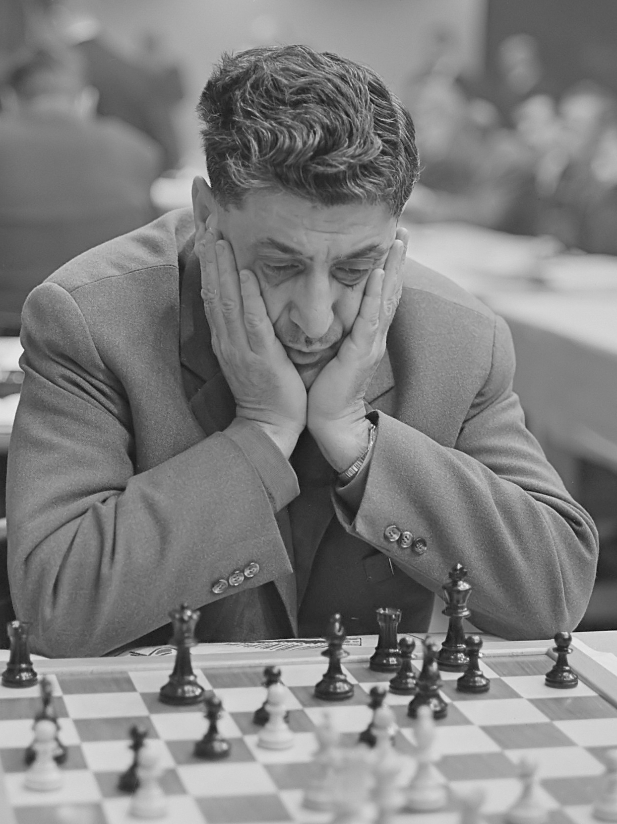 Hoogovenschaaktoernooi, Gereben 9 januari 1963